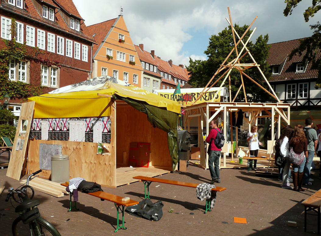 Nachbau Republik_Freies_Wendland__